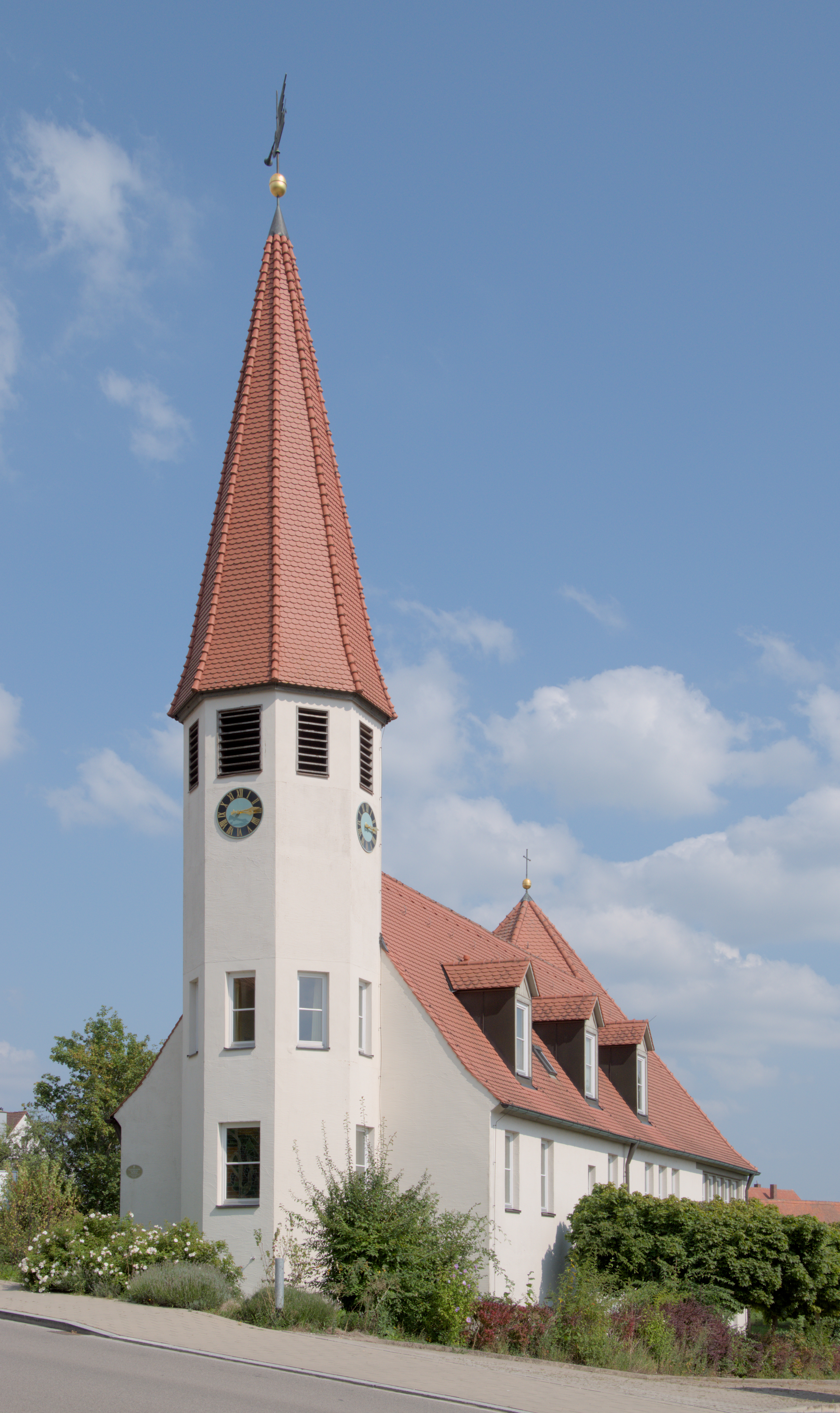 Evangelische Kirche St. Johannis in Abenberg.